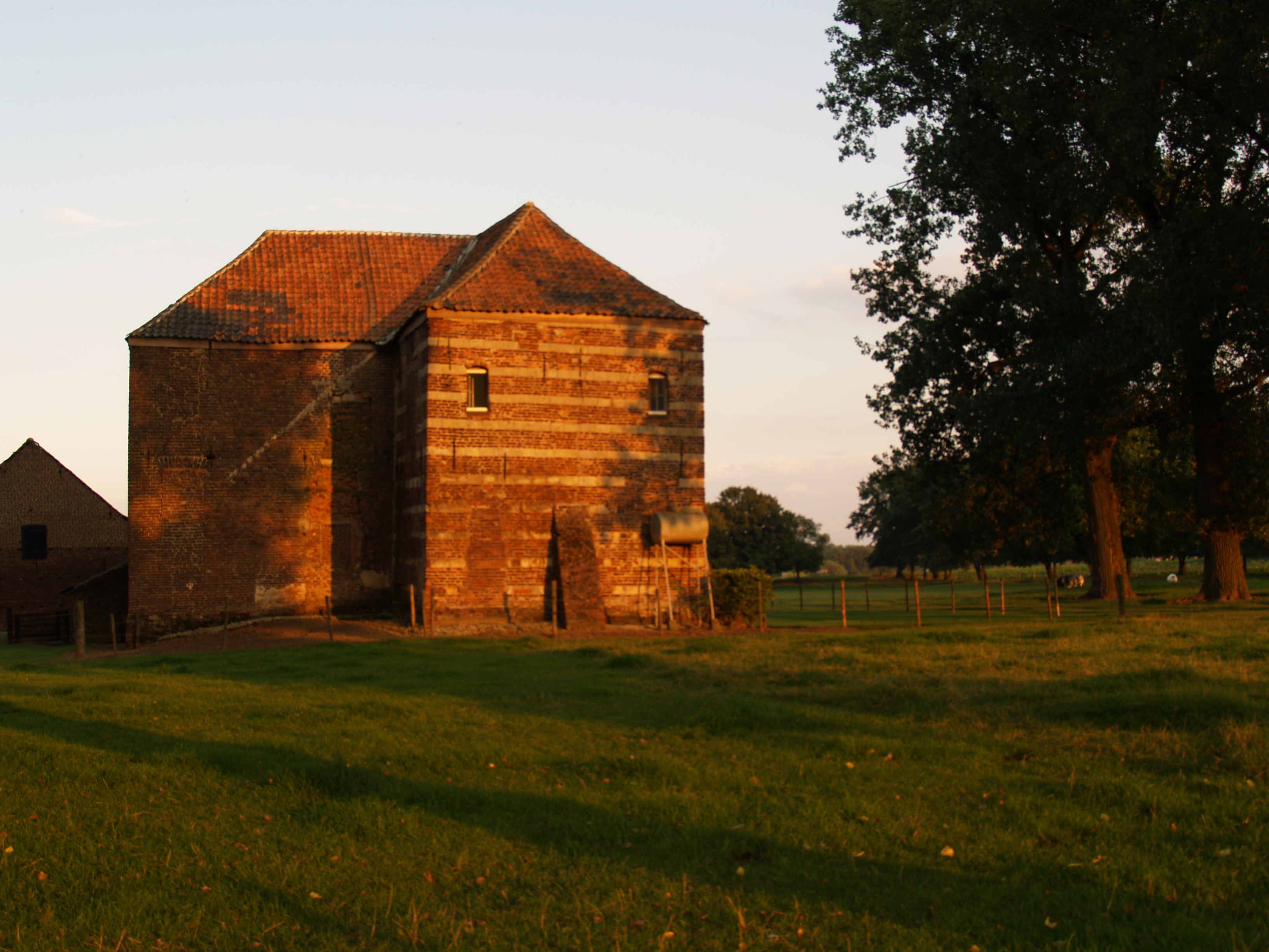 Huis Oijen, Kessel (Limburg) gezien vanaf de achterzijde.